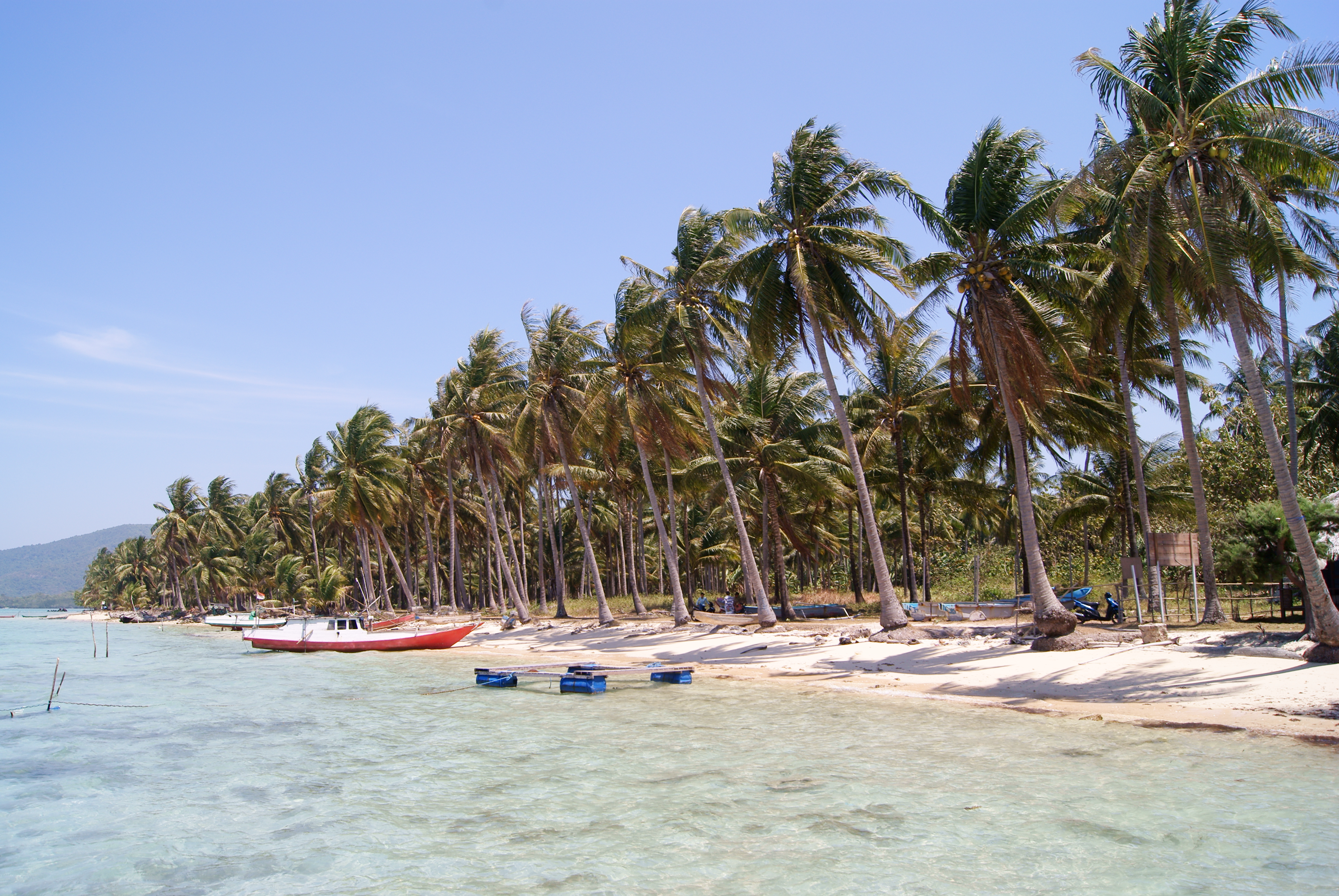 Pantai Barakuda, Karimun Jawa